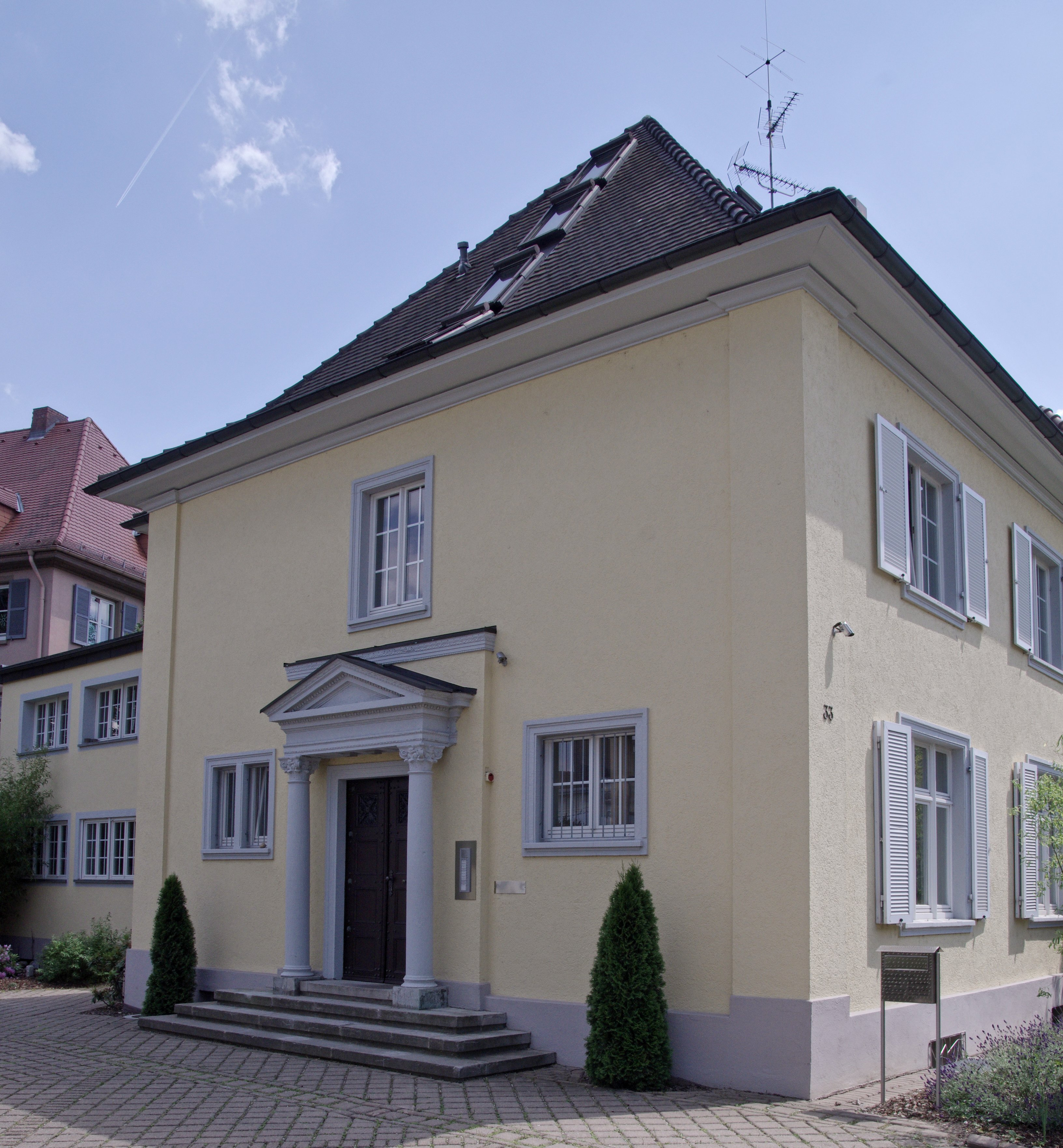 Haus des Ludwig Kubanek